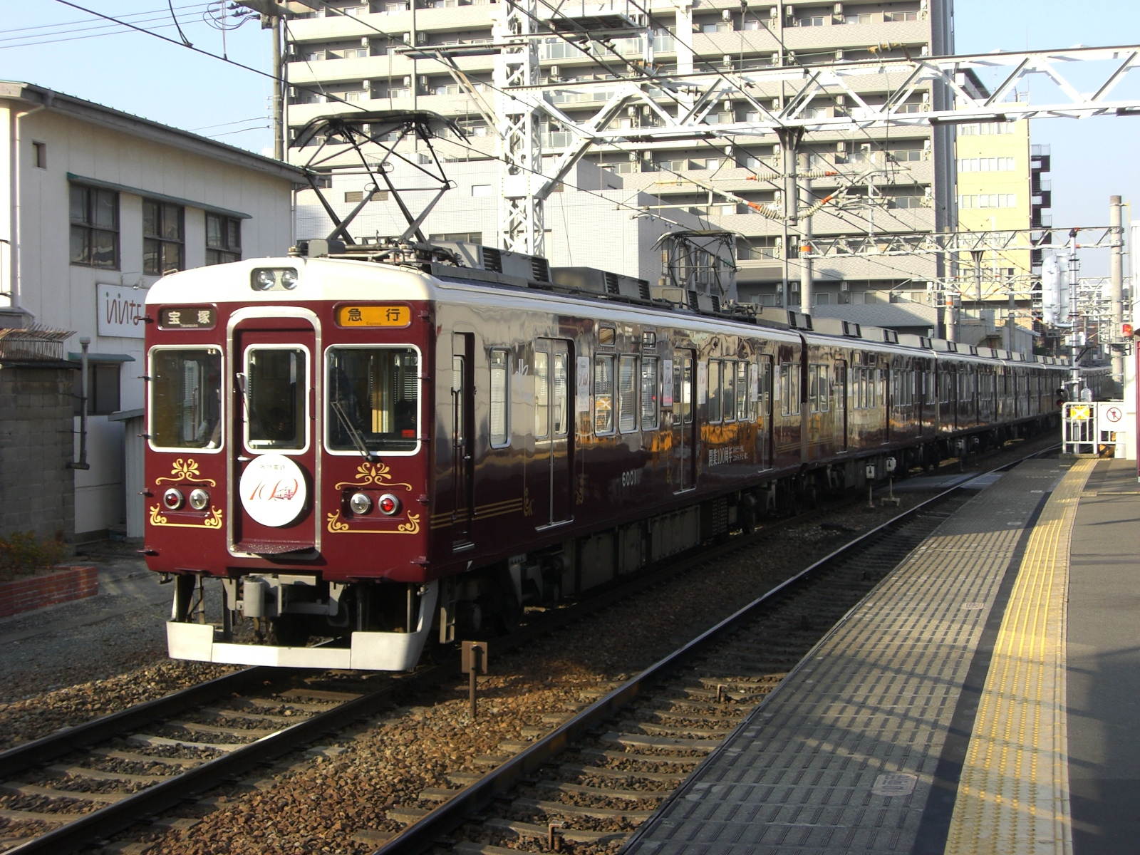 阪急電鉄100年ミュージアム号